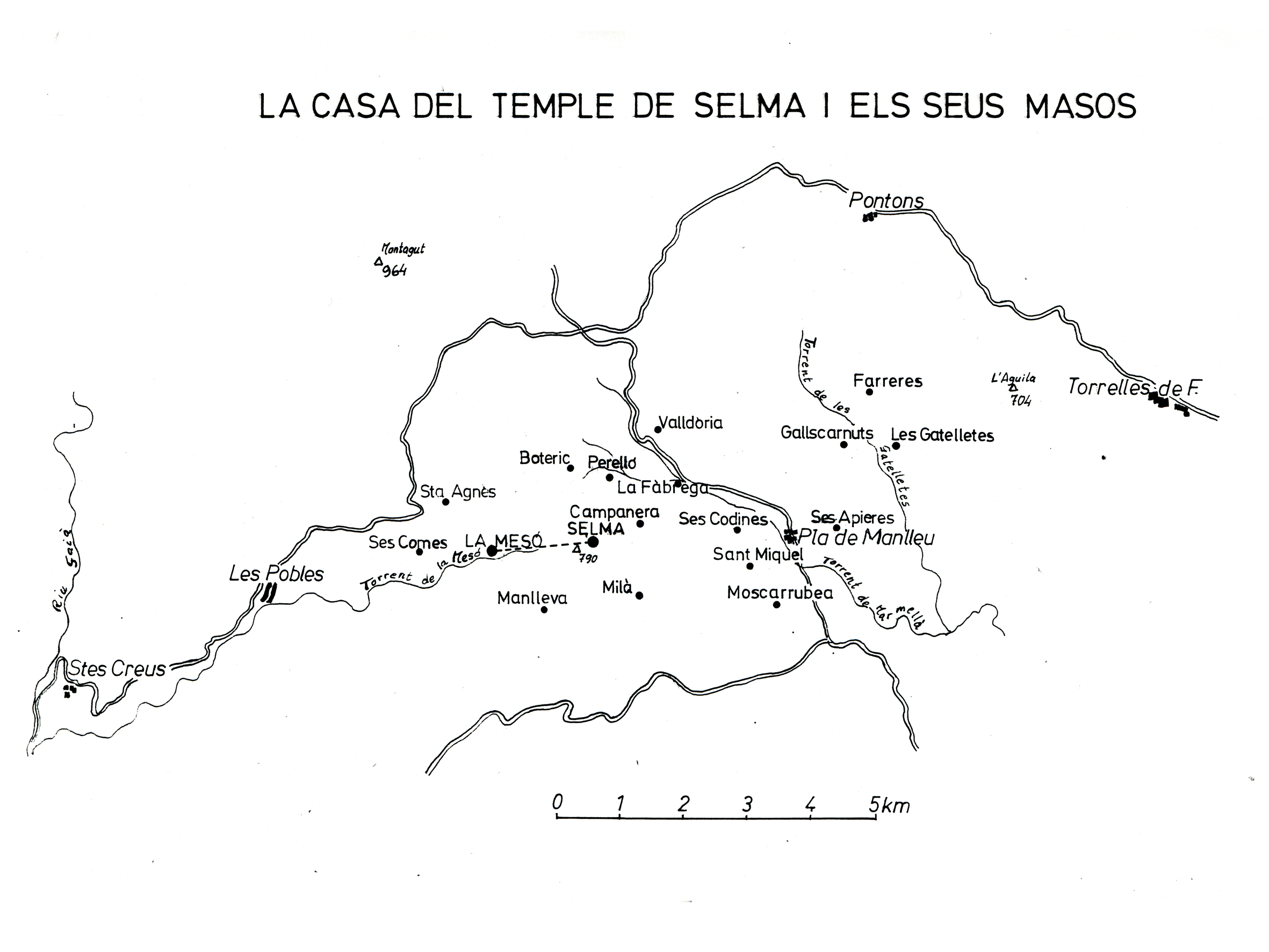 Mapa de la comanda templera de Selma amb els seus masos. Dibuix J. Fuguet